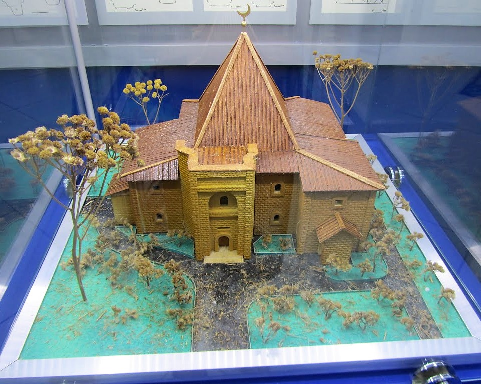 Татарча/tatarça: Викисәфәр Биләр